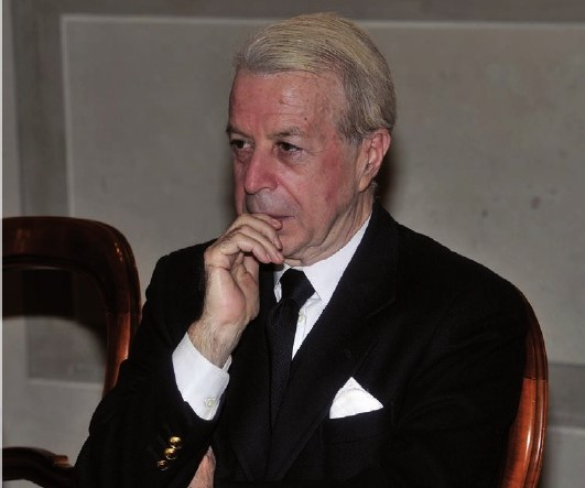 Foto scattata all' Ambasciatore Pacifico al convegno di Città di Castello del 2014